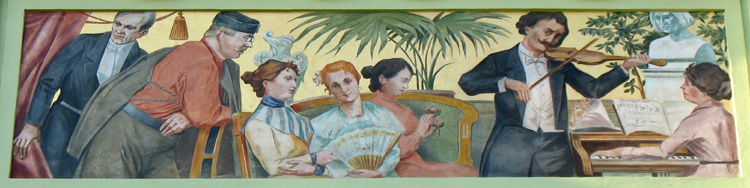 Nástěnná malba Koncert od Ládi Nováka na průčelí Měšťanské besedy v Plzni.